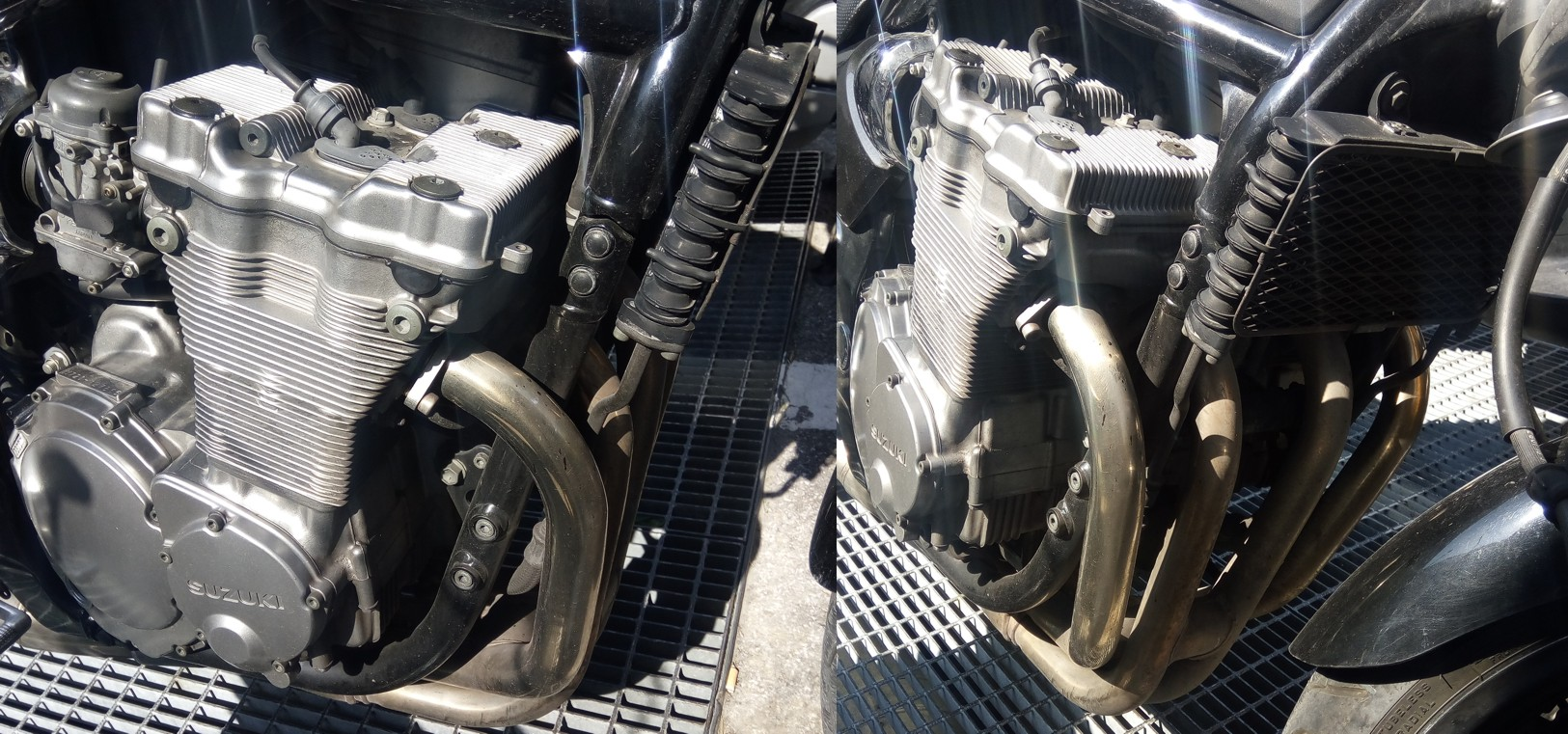 Suzuki Bandit con motore a raffreddamento SACS